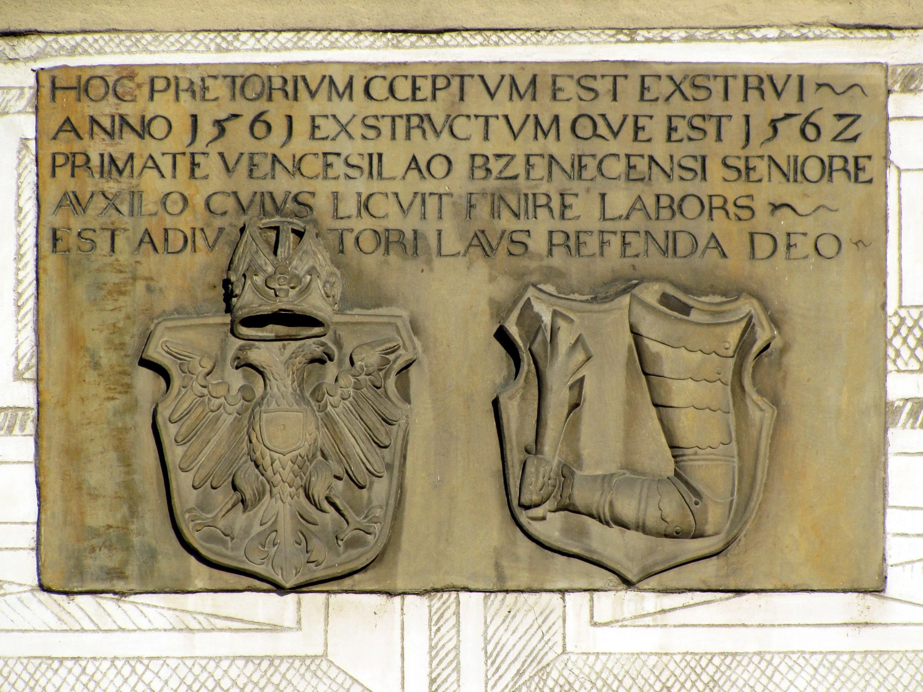 Nápis nad vchodem do renesanční radnice v Kyjově, upomínající na její výstavbu v letech 1561-1562 za primátora Václava staršího Bzeneckého. Text: HOC PRETORIVM CCEPTVM EST EXSTRVI ANNO 1561 EXSTRVCTVM QVE EST 1562 PRIMATE VENCESILAO BZENECENSI SENIORE AVXILO CVIVS LICVIT FINIRE LABORS EST ADIVTORI LAVS REFENDA DEO